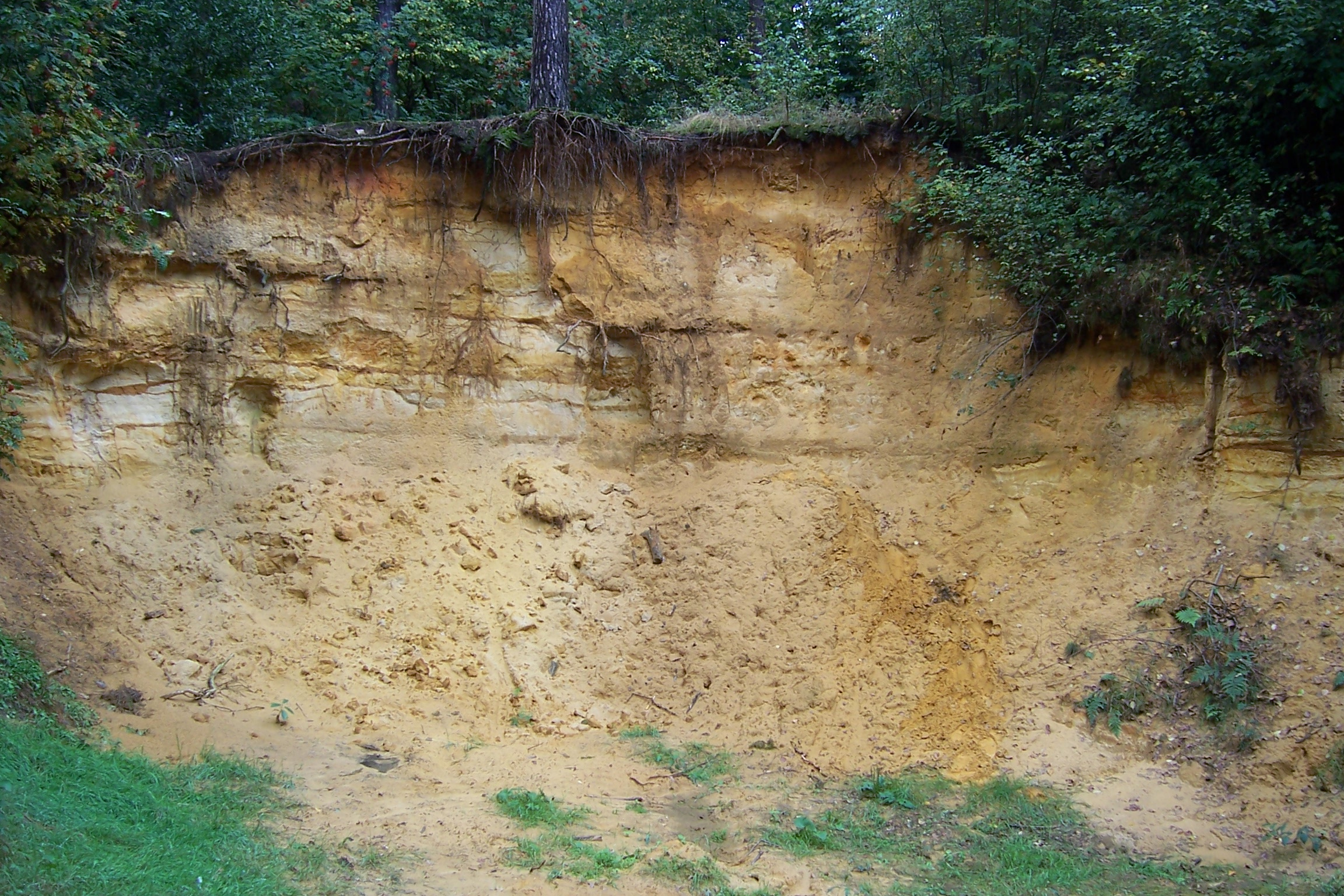 Sandsteilwand in den Rekenr Bergen.